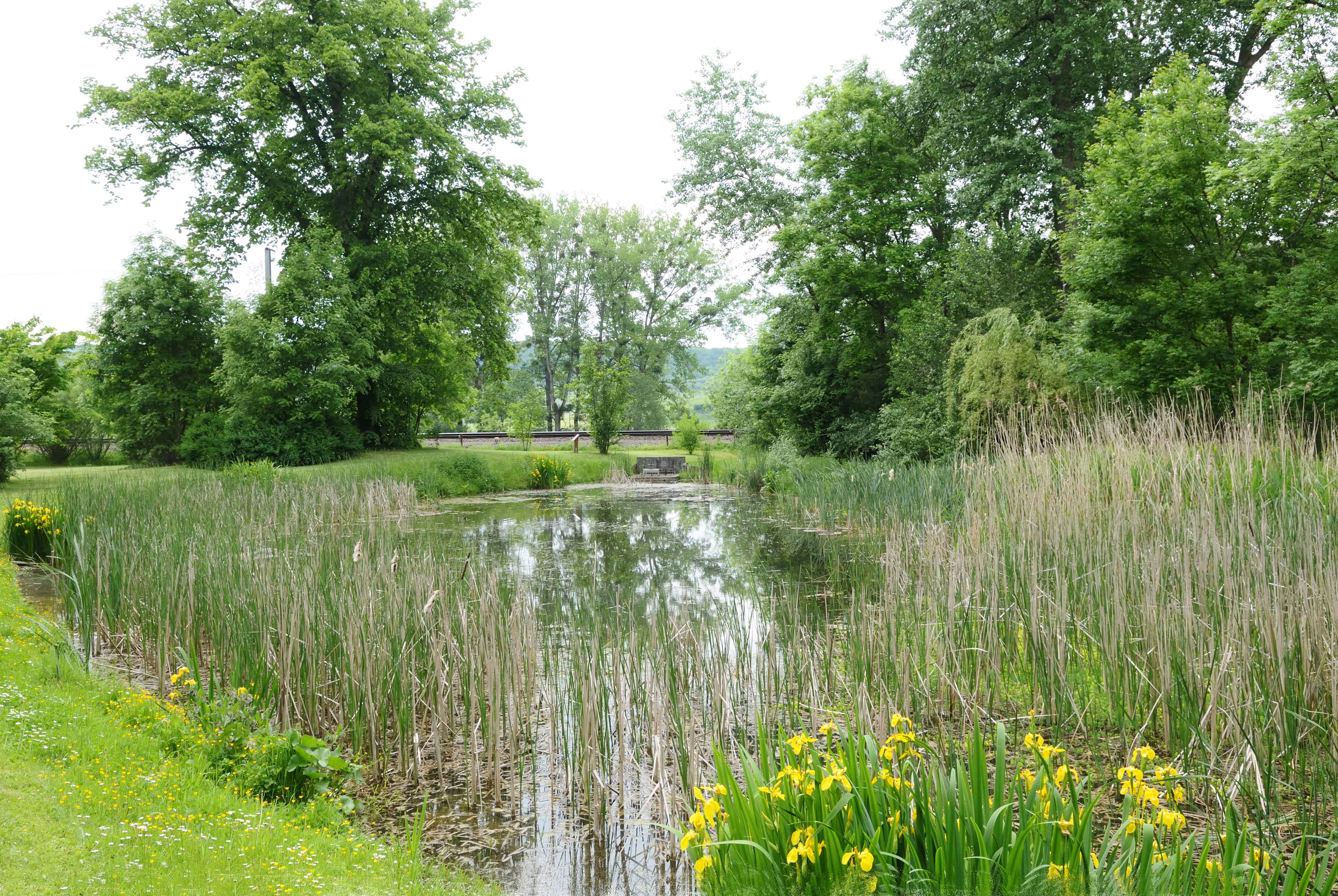 Weier am Park zu Bouferdeng. Bouferdeng + Kategorie:Gemeng Luerenzweiler